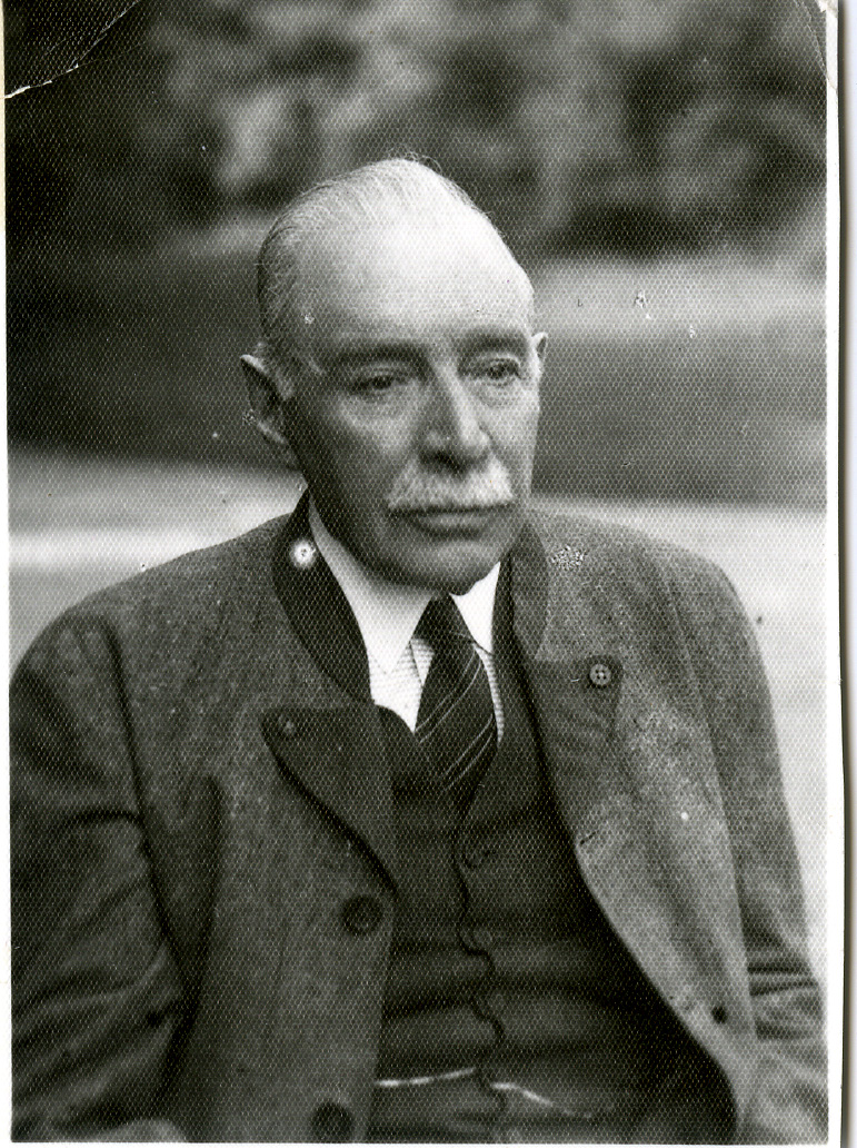 Gustav Philipp Ritter von Schoeller